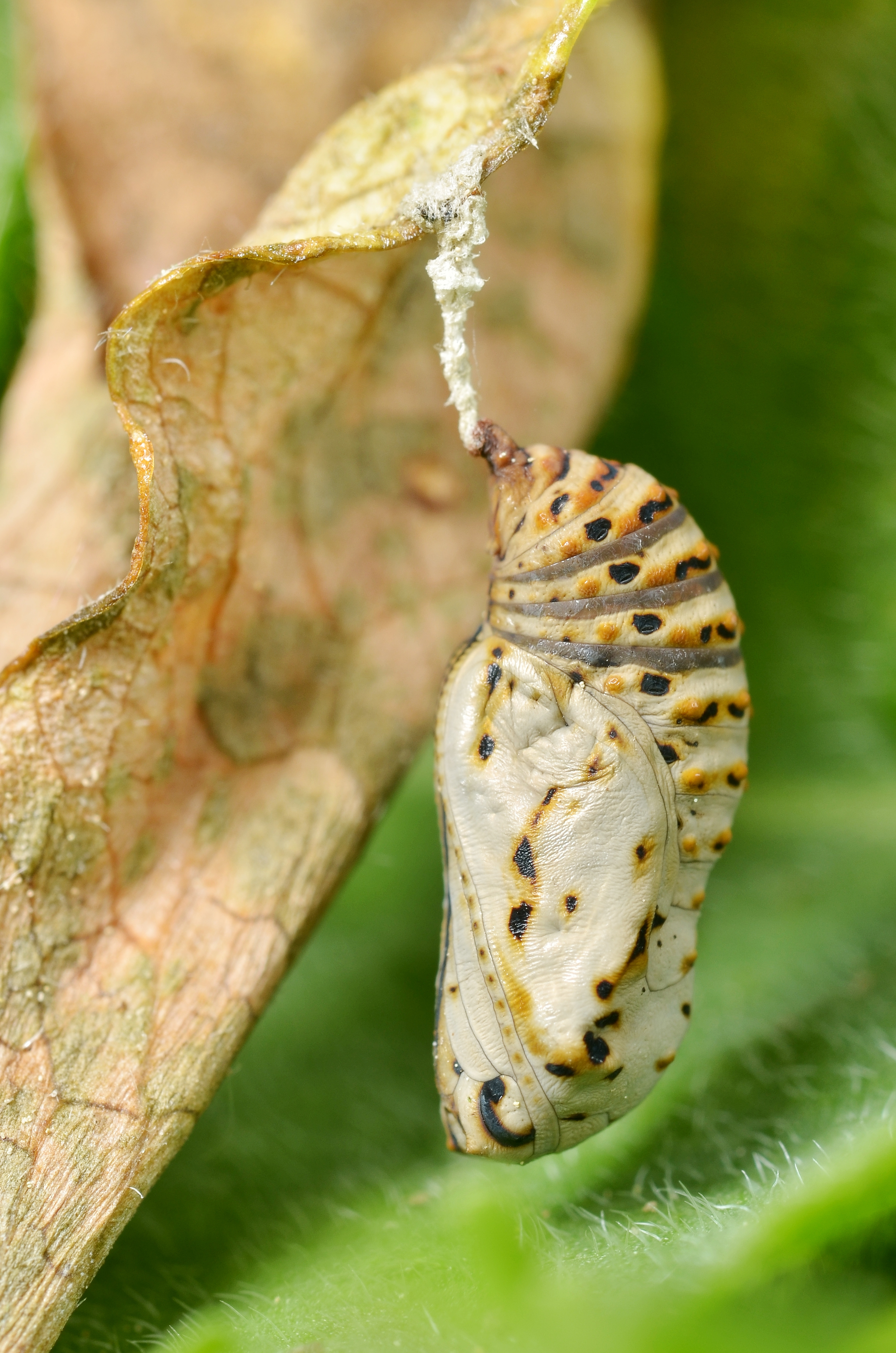 Euphydryas aurinia chrysalis (pupa)